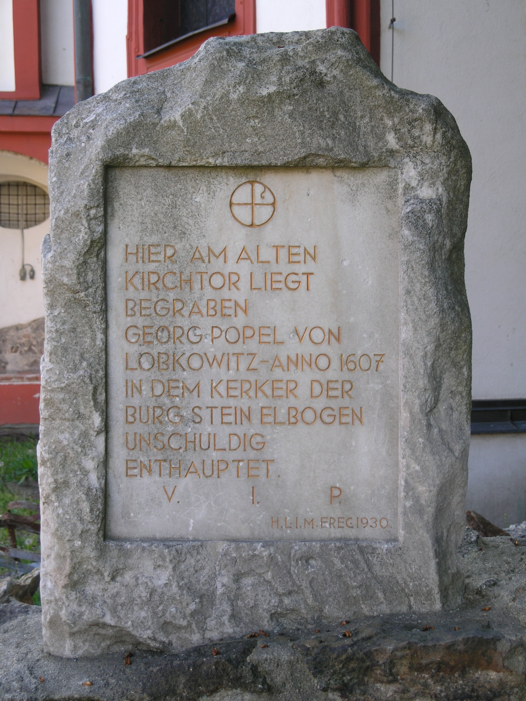 Loket (okres Sokolov) - náhrobní kámen věnovaný Jirimu Popelovi z Lobkovic (u kostela sv. Václava, přístup ze Zámecké ulice)